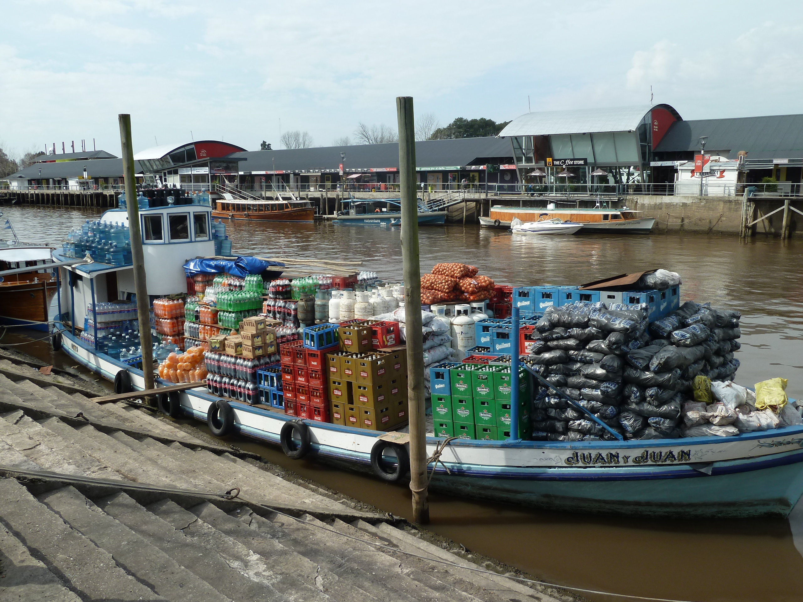 Lancha Almacen. Enbarcación utilizada en el Delta del Paraná. Argentina.